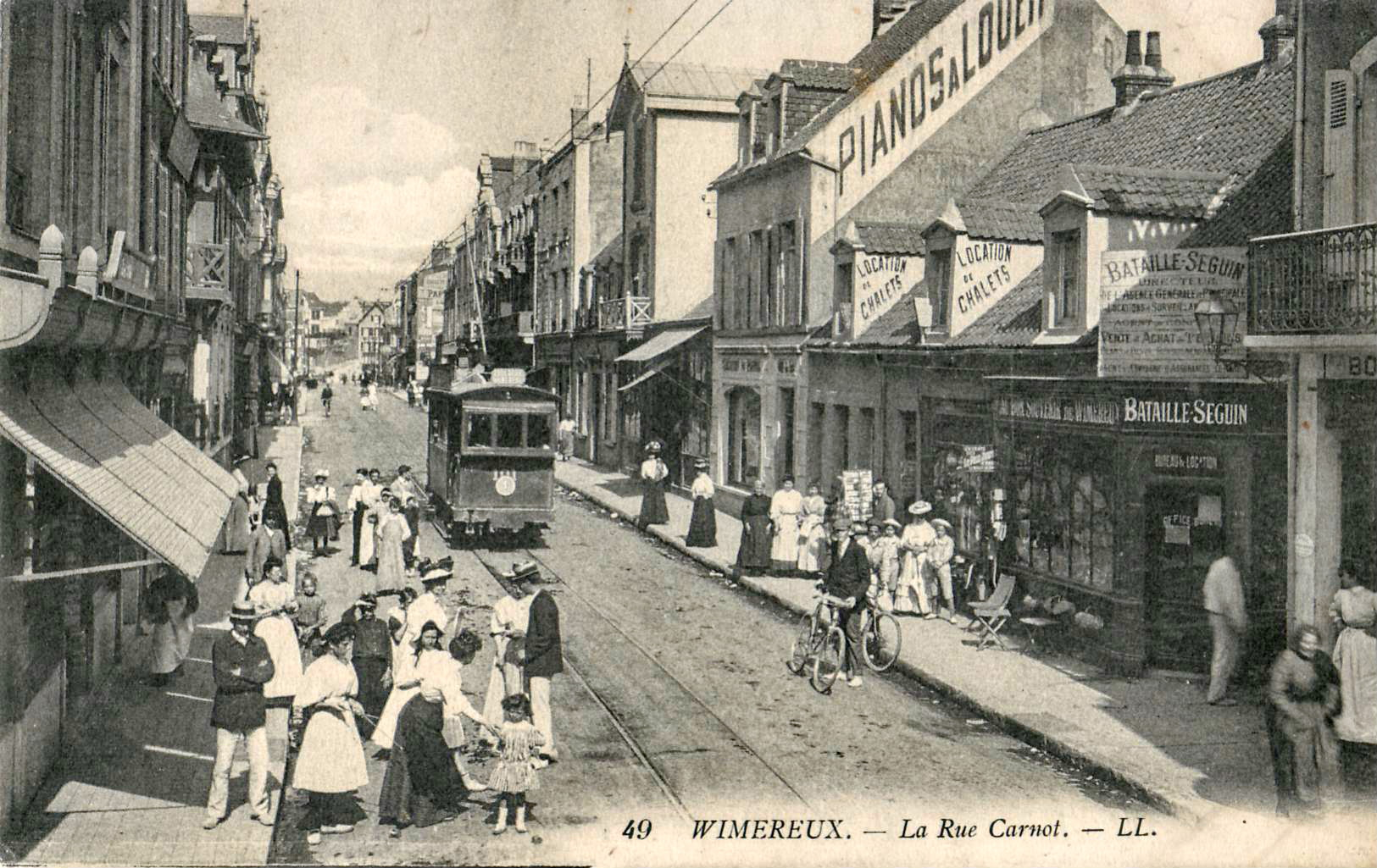 Carte postale ancienne éditée par LL, n°49 :WIMEREUX - Le Rue Carnot